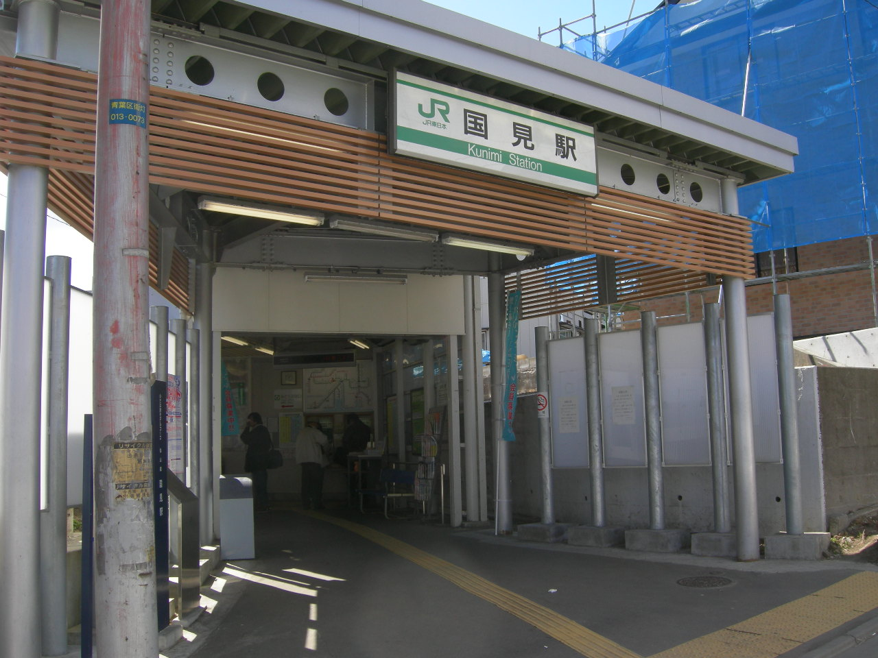 JR仙山線（JR Senzan line）国見駅（Kunimi station）駅舎入口